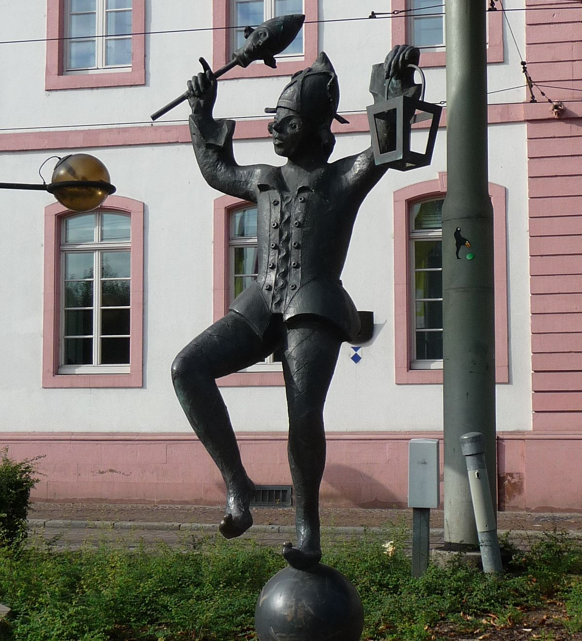 Bajazz mit der Laterne von der Mainzer Künstlerin Inge Blum, eine Symbolfigur des Mainzer Karnevals